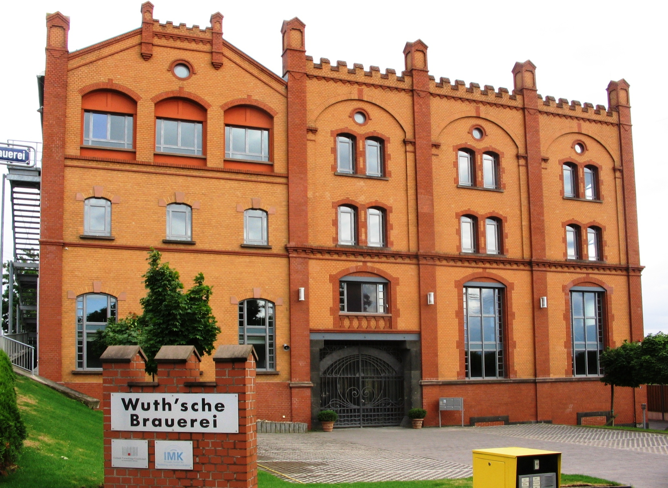 Ehemalige Wuth’sche Brauerei am Ende der Mainzer Straße in Wiesbaden